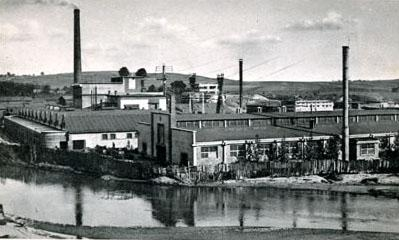 Farbyka braci Szajn w Sławkowie (woj. śląskie)